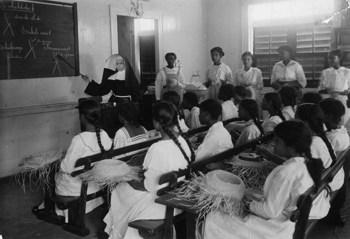 Foto. Klassikaal onderwijs op de vlechtschool van het Maria-patronaat te Paramaribo